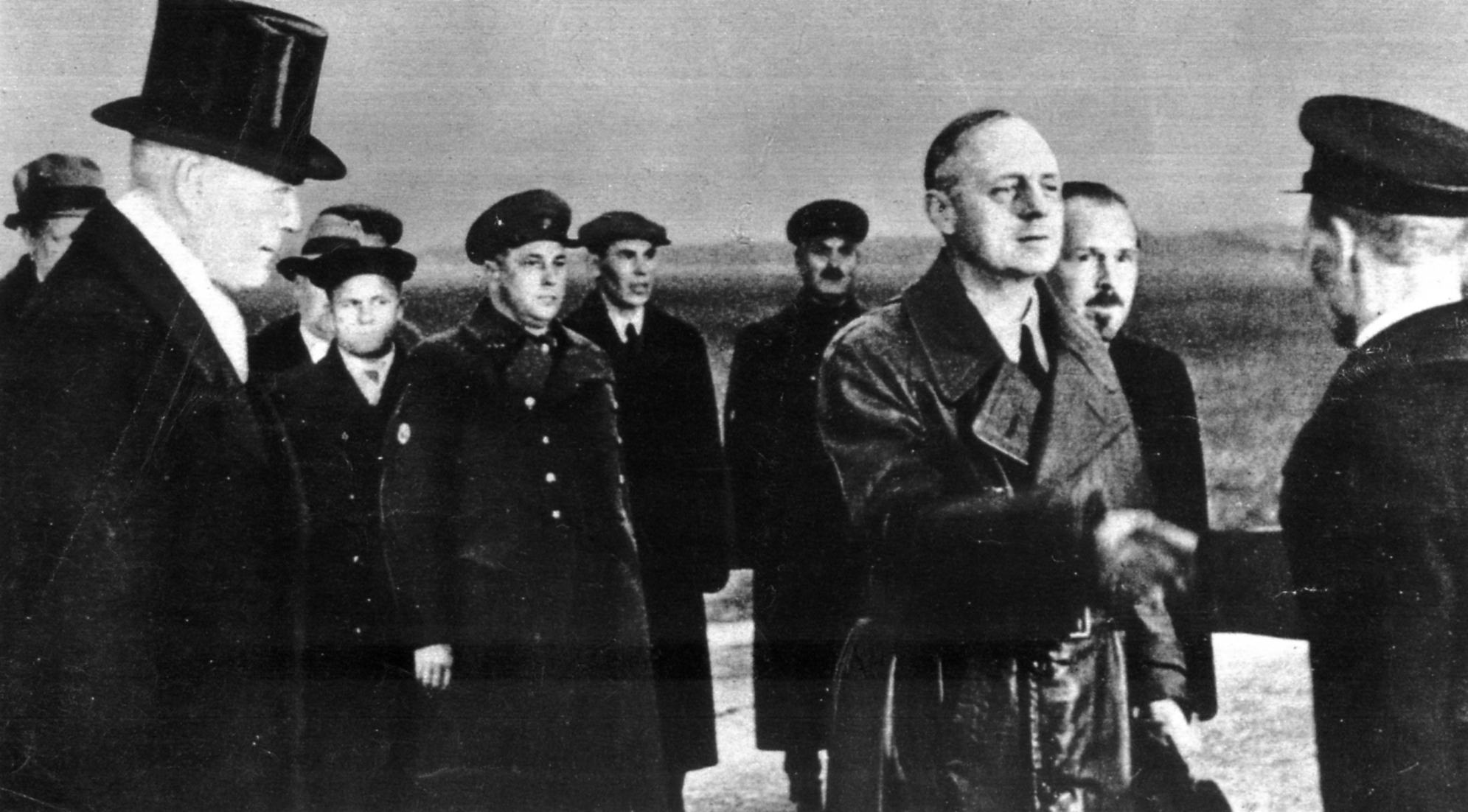 Риббентроп на аэродроме в Москве 30 марта